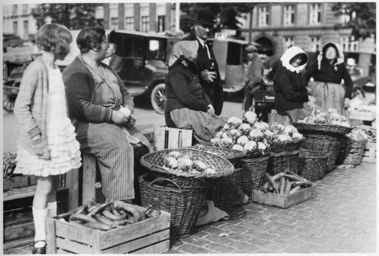 Grønttorvet på den plads, der nu har navnet Israels Plads. Til højre ses "amagerkoner" med typisk hovedbeklædning